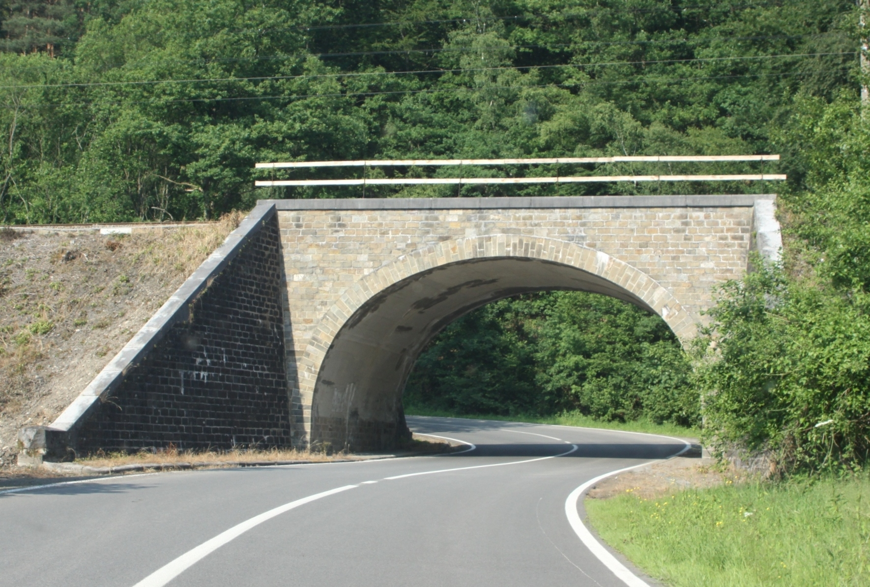 De Pont de Targnon op der SNCB-Linn 42. Targnon Targnon Pont de Tarnong Pont Targnon Targnon